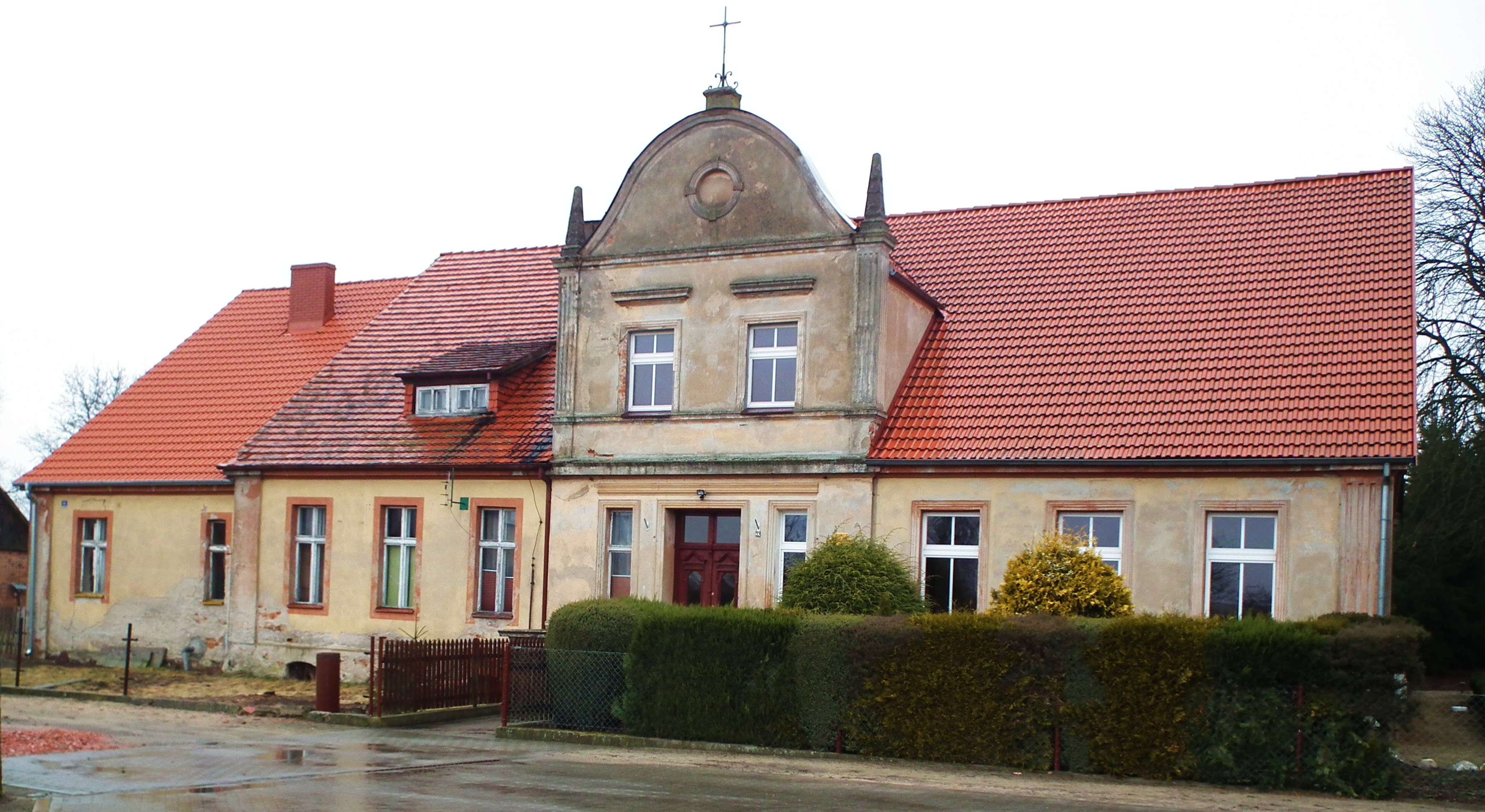 Centrum Śmiardowa Krajeńskiego.